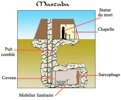 Description de l'image : Dessin personnel d'un mastaba Source : Ekipage Statut : GFDL Ekipage